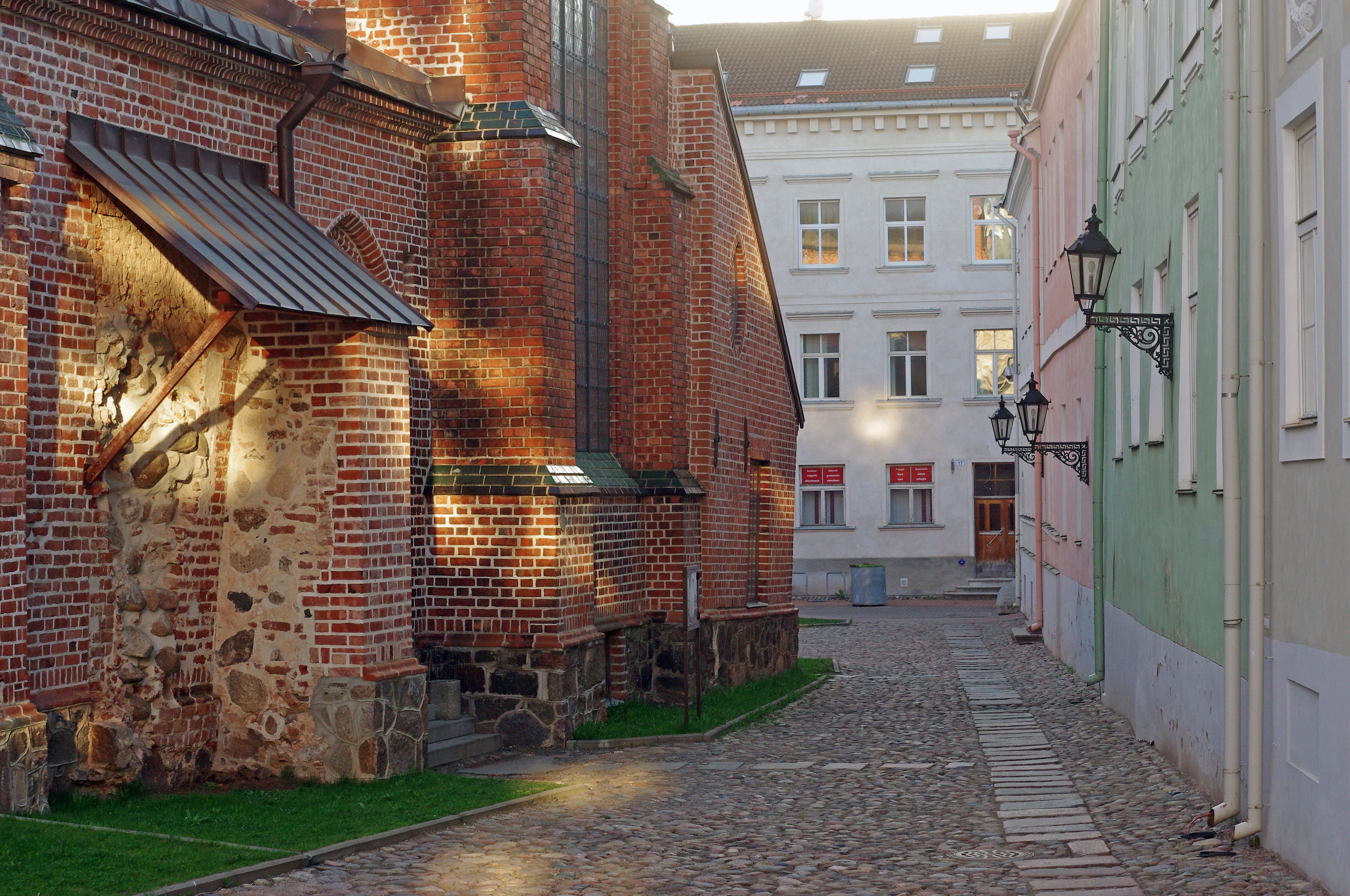 Lübecki tänav Tartus, 6. mai 2012